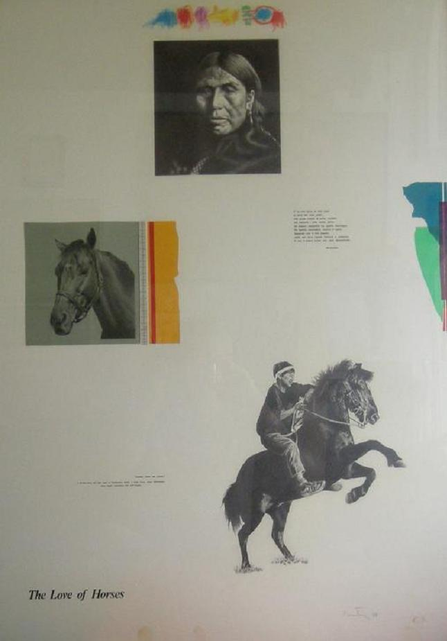 The Love of Horses - Olio e Matita su Cartoncino bianco - 1978